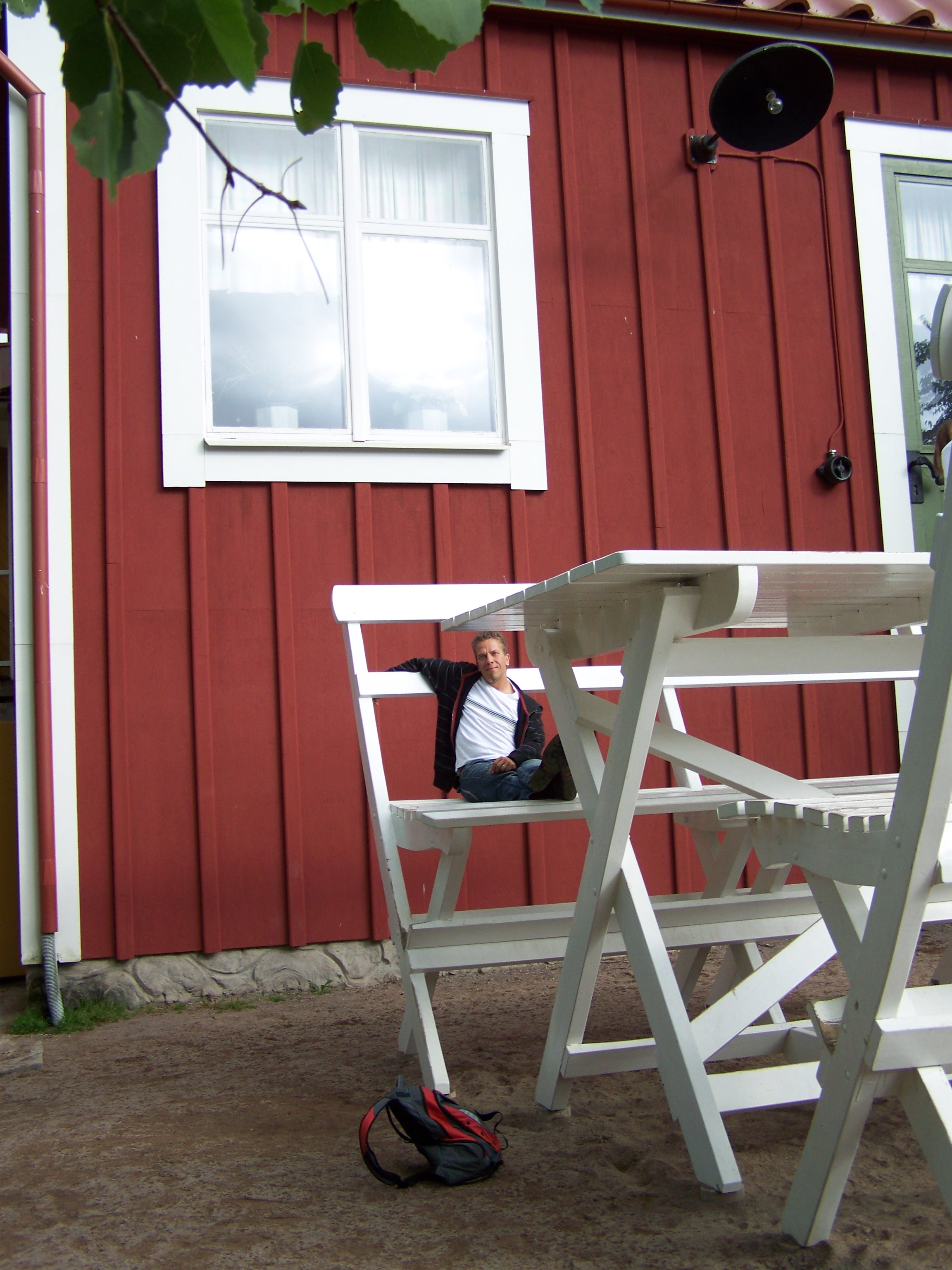 In Schweden. Astrid Lindgrens Värld. Die Person auf dem Foto hat der Veröffentlichung auf Wikimedia Commons zugestimmt.